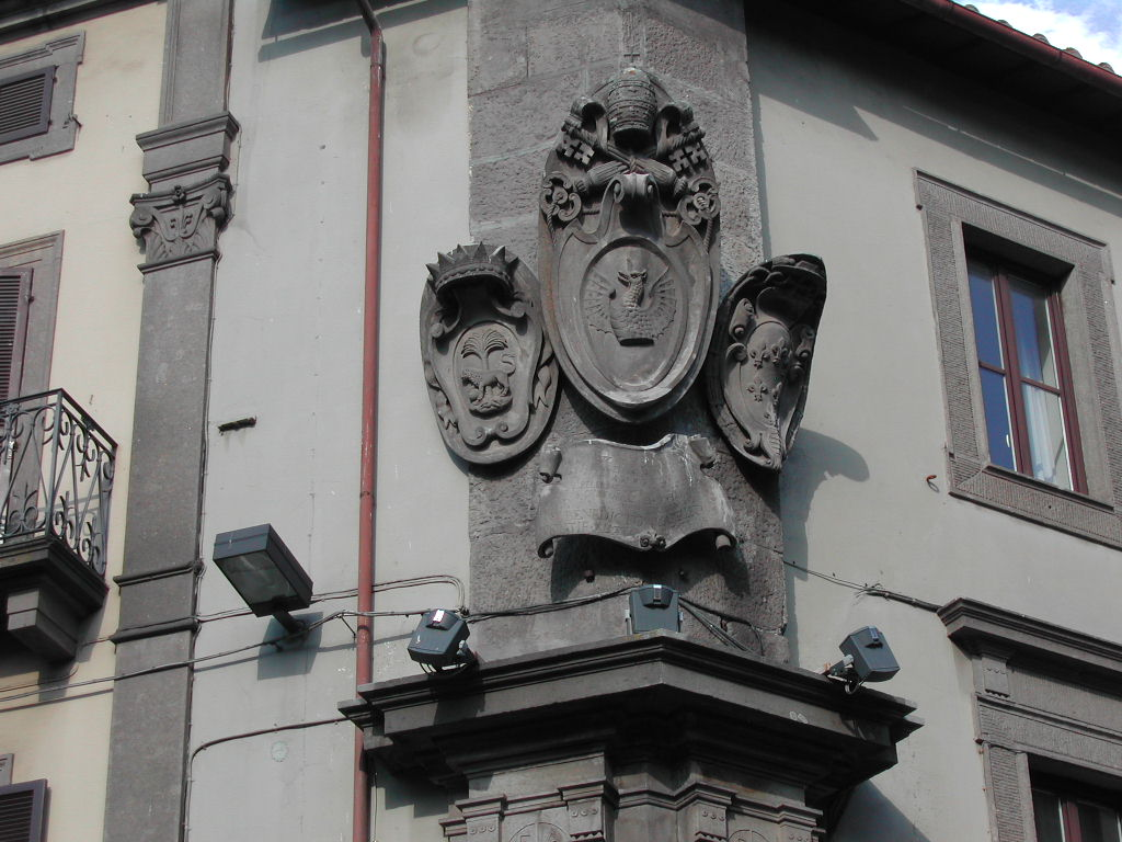 Viterbo, stemmi sul Palazzo comunale: A sinistra il leone che rappresenta la città, a destra lo stemma dei Farnese.